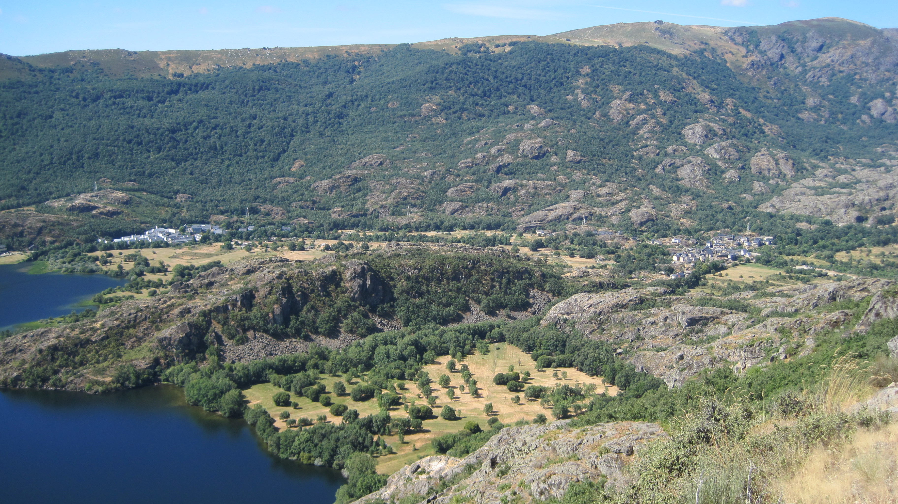 Vista de Ribadelago y Ribadelago Nuevo, junto al lago de Sanabria (Zamora, España).